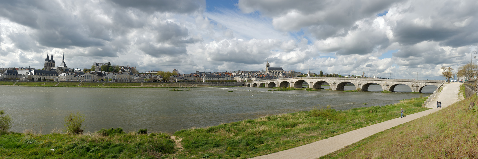 Vue panoramique de Blois depuis la rive gauche de la Loire